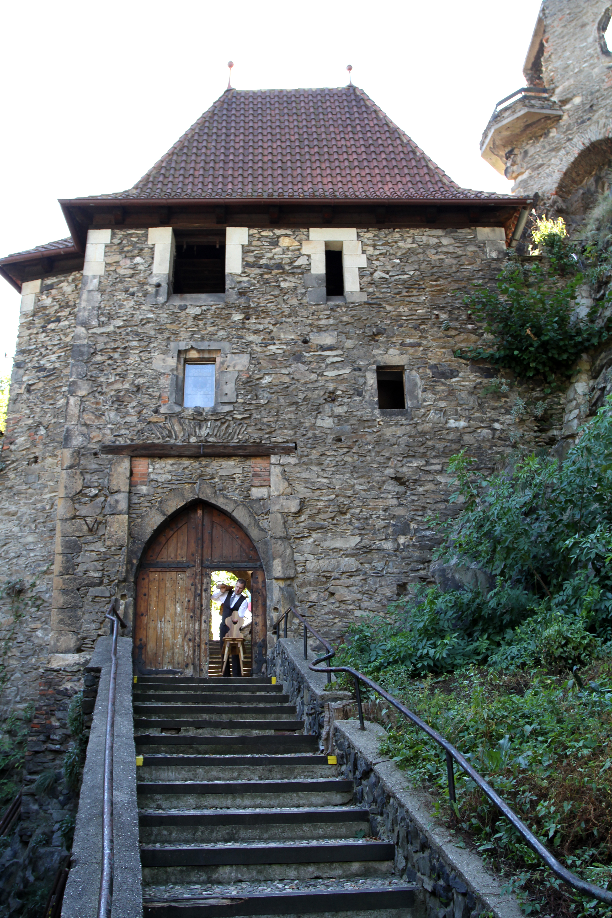 Hrad Střekov, zřícenina (Střekov), Střekov